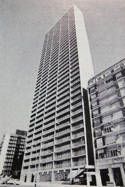 El Edificio Demetrio Elíades en el Bv. Marítimo Peralta Ramos y calle Olavarría. Ciudad de Mar del Plata, provincia de Buenos Aires, Argentina. Uno de los edificios más altos de Argentina en su momento (125 metros), es conocido como Edificio Havanna por poseer el logo de la empresa en su azotea.